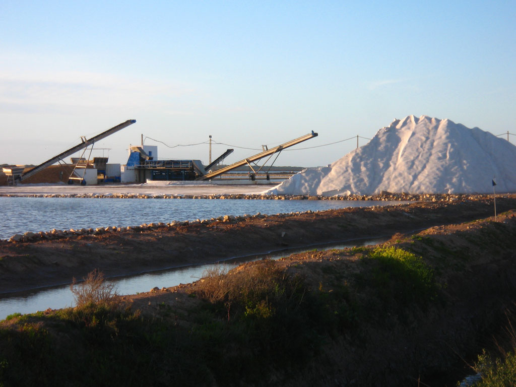 Salinas (saltworks), Sanlúcar de Barrameda (Cádiz-Andalucía-España)